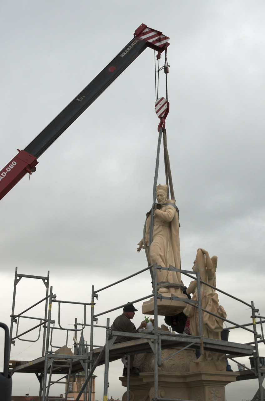 Osazování kopie sochy sv. Františka Borgiáše na Karlově mostě 31. 10. 2017